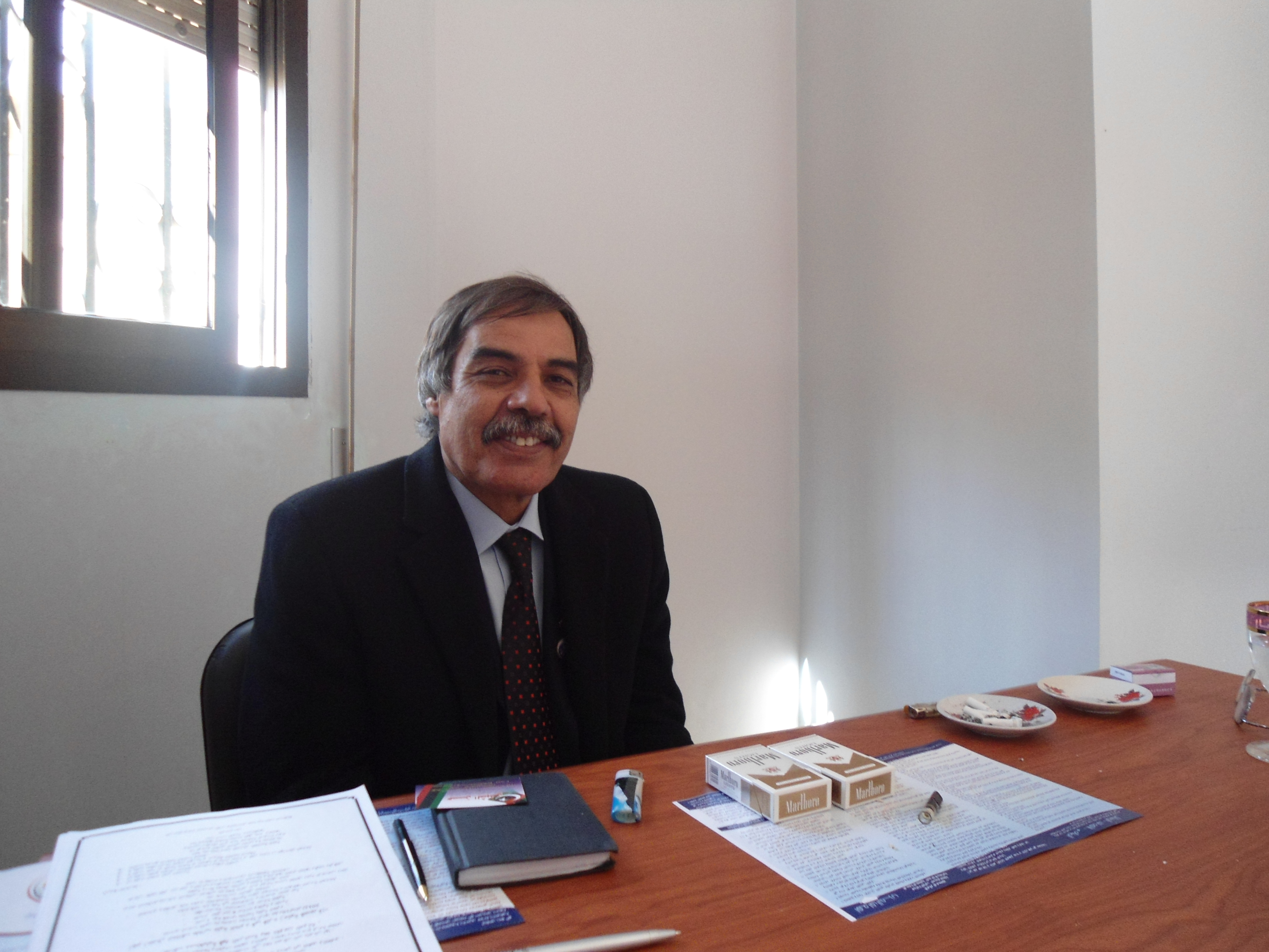 Former NTC minister Ali Tarhouni supports decentralisation within a united Libya. الوزير السابق في المجلس الوطني الانتقالي علي الترهوني يدعم اللامركزية داخل ليبيا الموحدة. L'ancien ministre du CNT Ali Tarhouni soutient la décentralisation au sein d'une Libye unie.